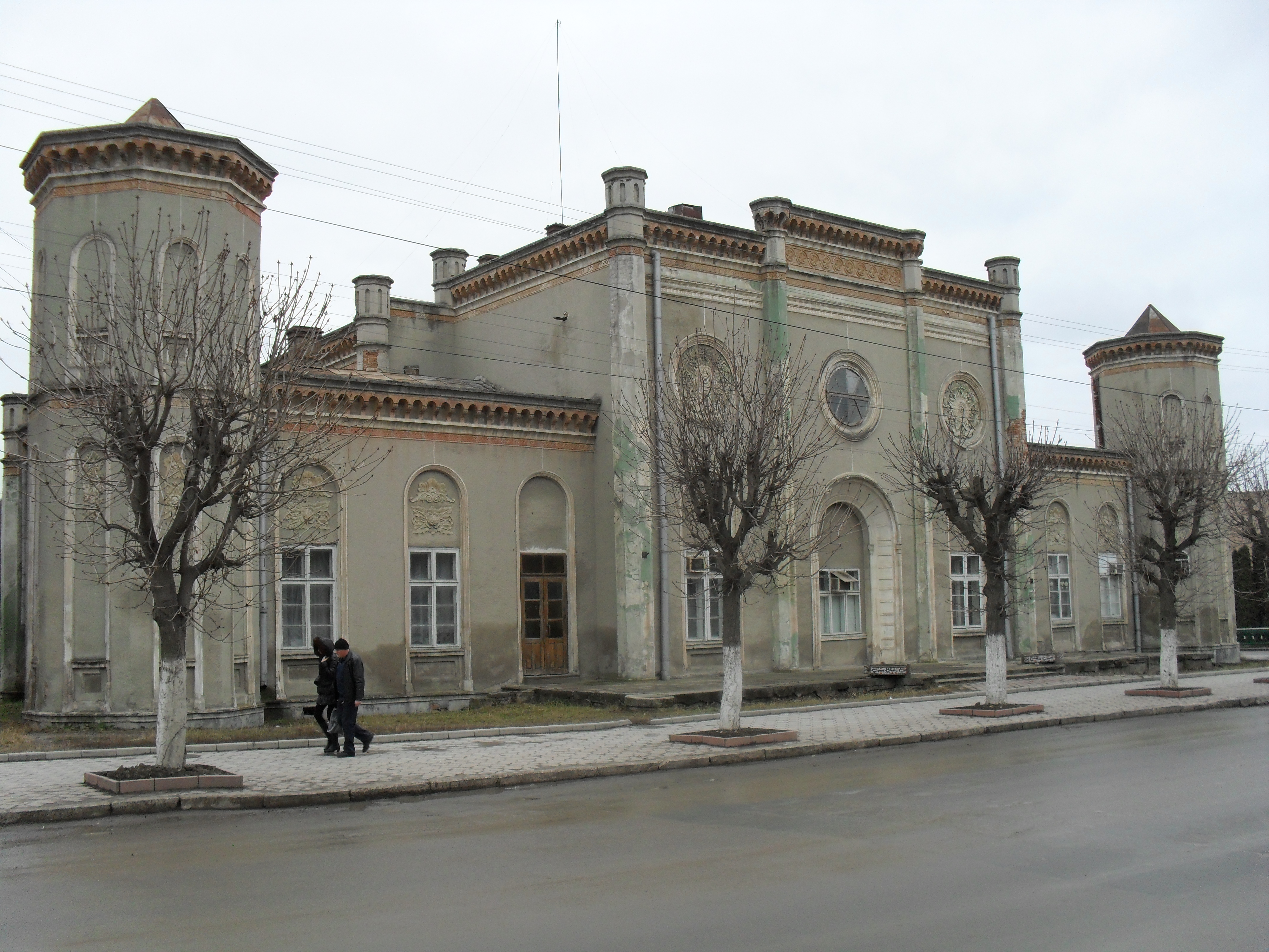 м. Чортків. Колишня синагога